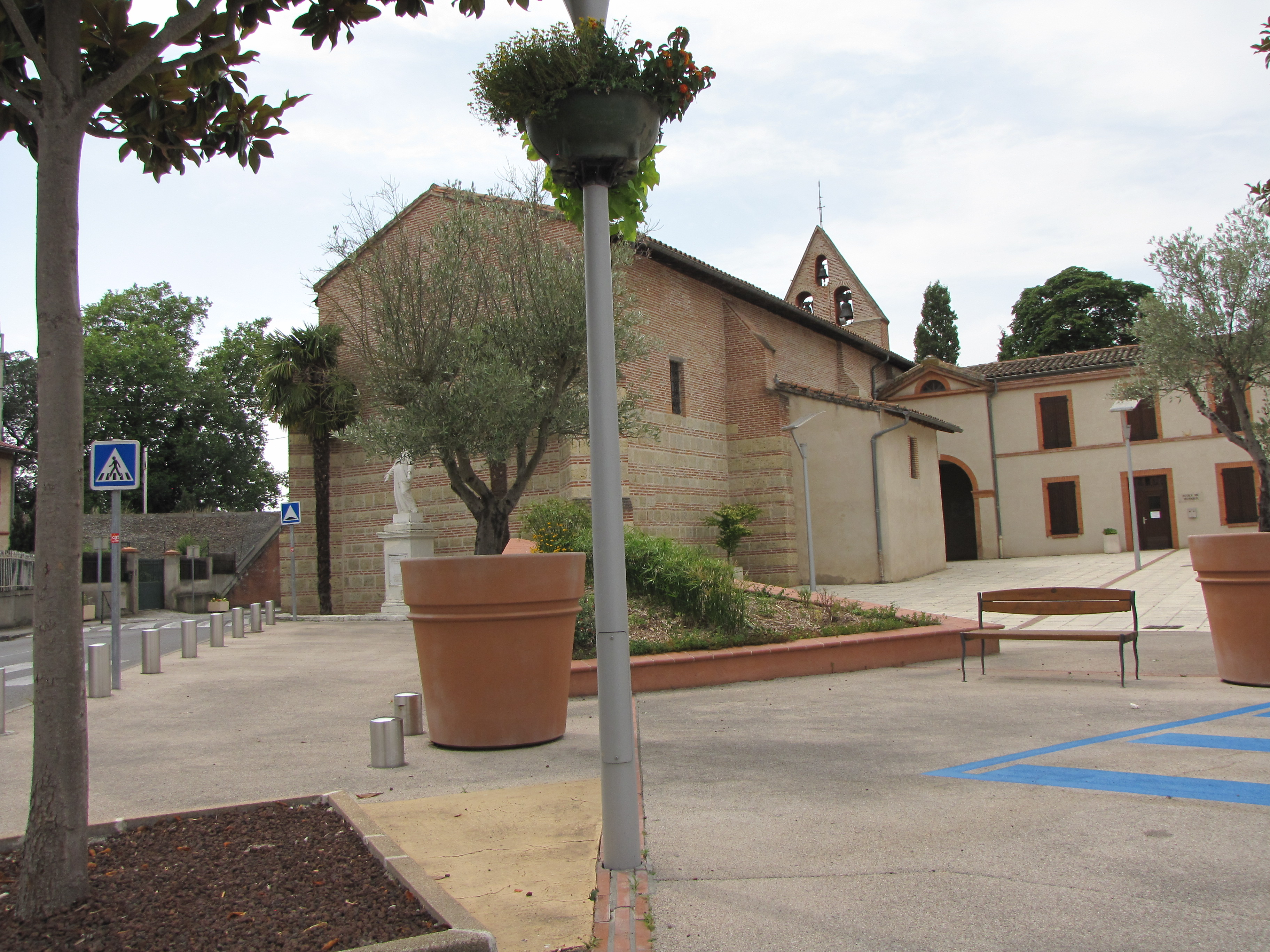 Église de Pinsaguel